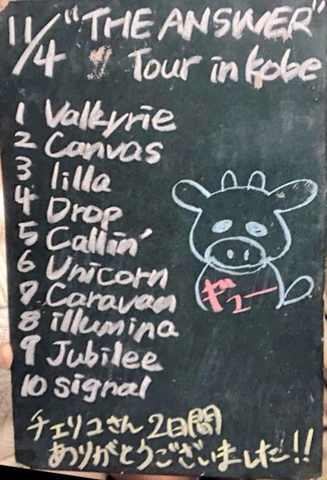 amiinAセトリボード(20181104(1))